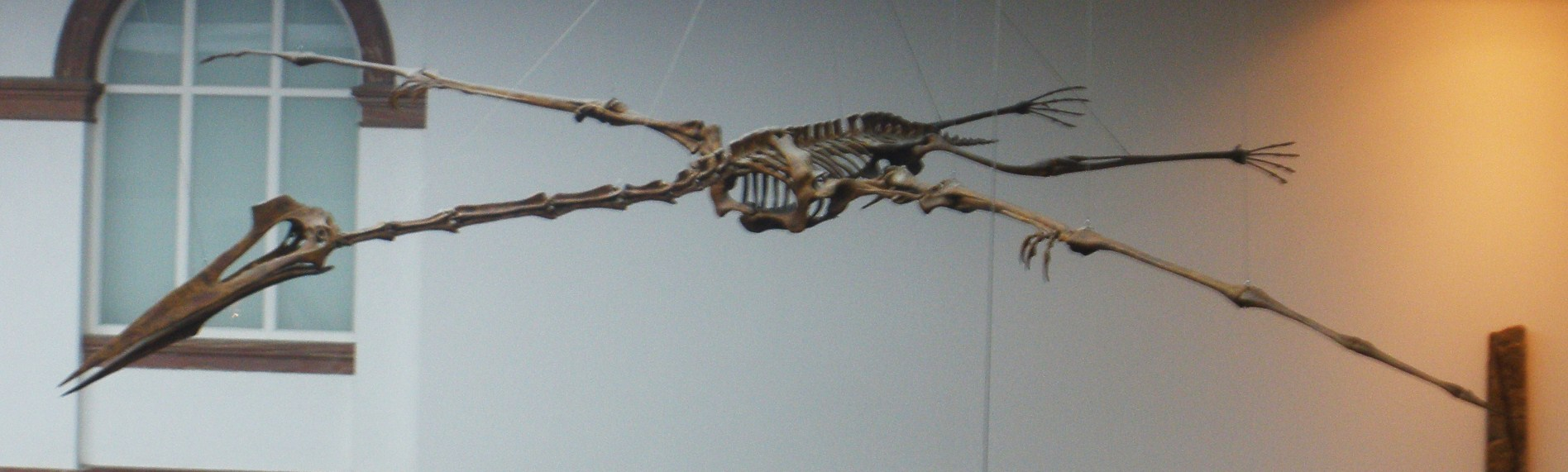 Fossil of Quetzalcoatlus, an extinct pterosaur- Took the photo at Senckenberg Museum of Frankfurt